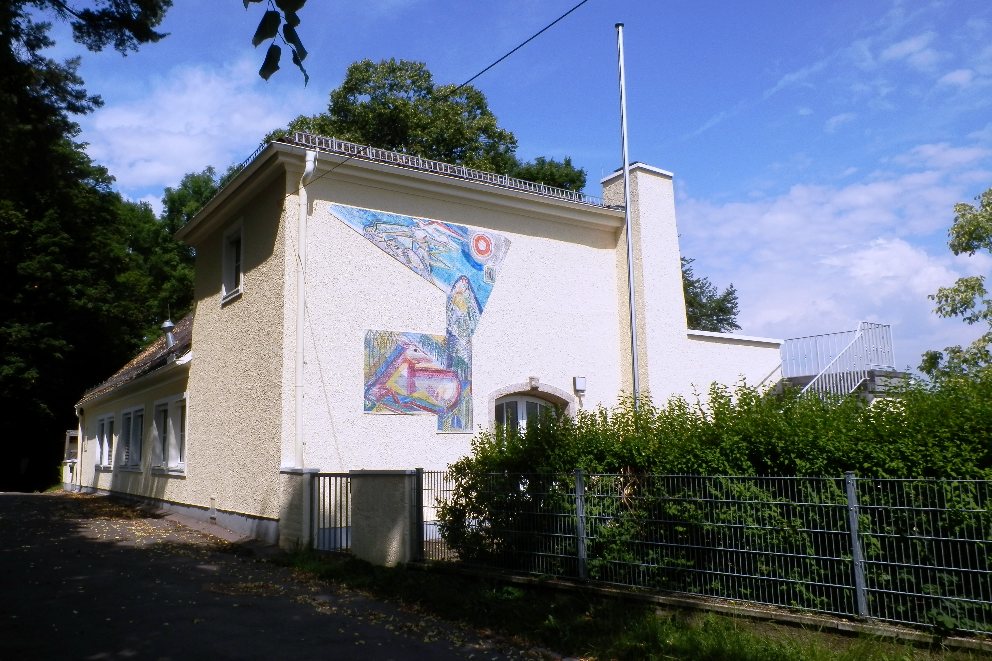 Ehem. Gasthaus Paradiesgarten, Linz, Römerstraße - heute städtischer Kindergarten. Keramikmosaik von Rudolf Kolbitsch